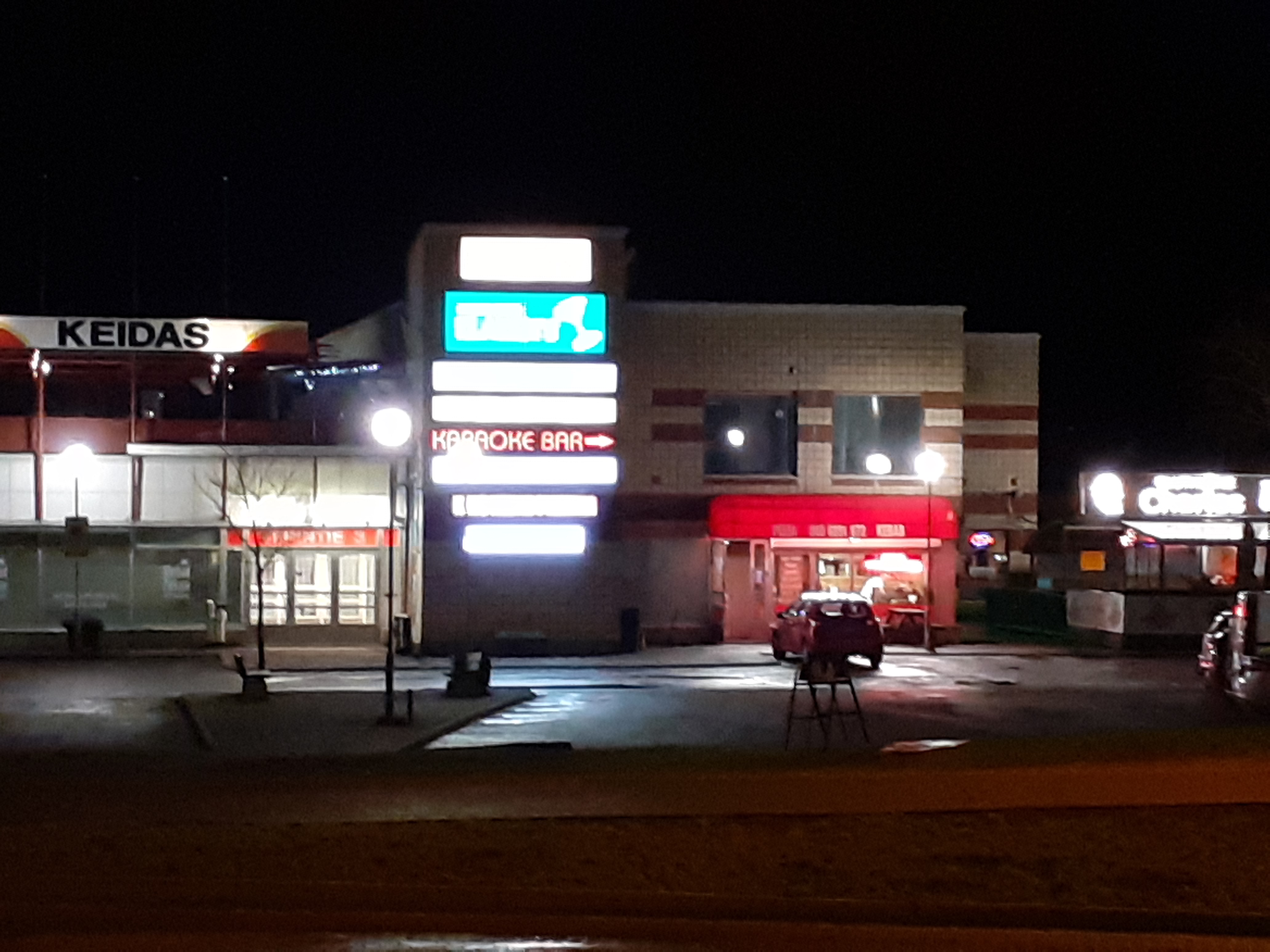 Kauppakeidas building, with karaoke bar and night club, in Klaukkala